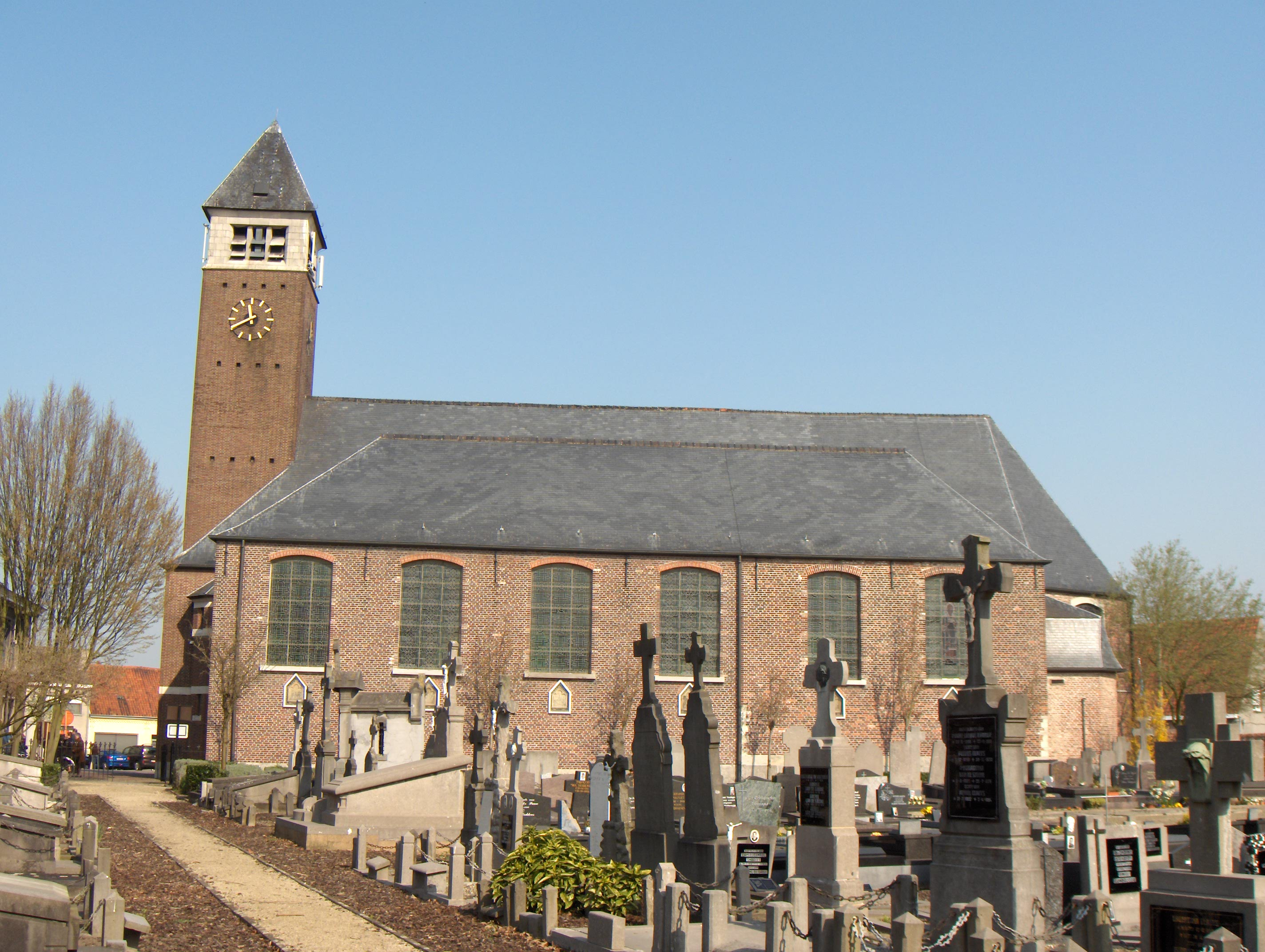 Evergem, Ortsteil Kluizen (Belgien, Prov. Ostflandern), O.L.V.-Geboortekerk